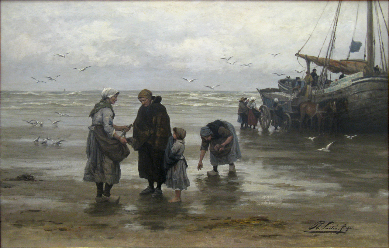 Het deel der armen / Philip Sadée (1937 - 1904). – 1901, 0331497 Philip Sadée (1837-1904) 1901